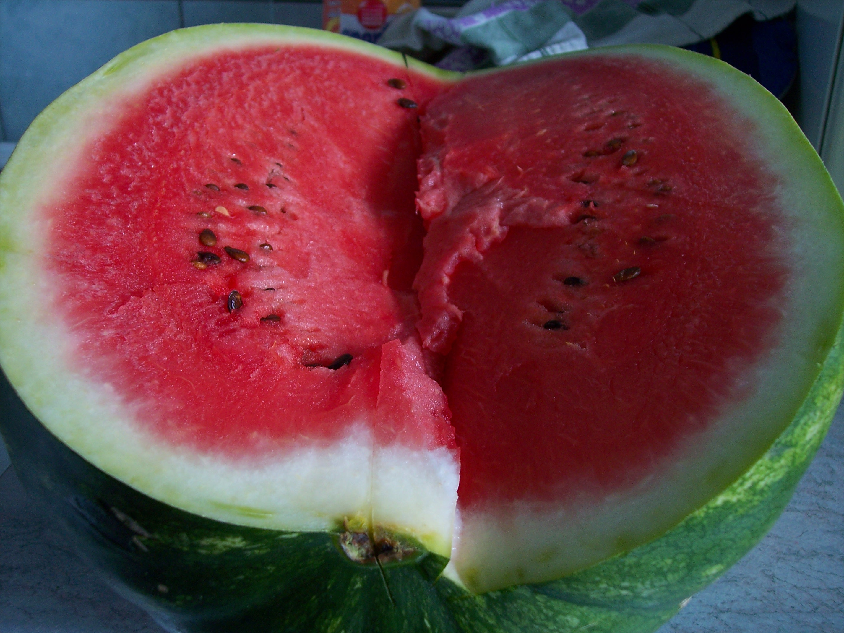 (Watermelon) Citrullus lanatus